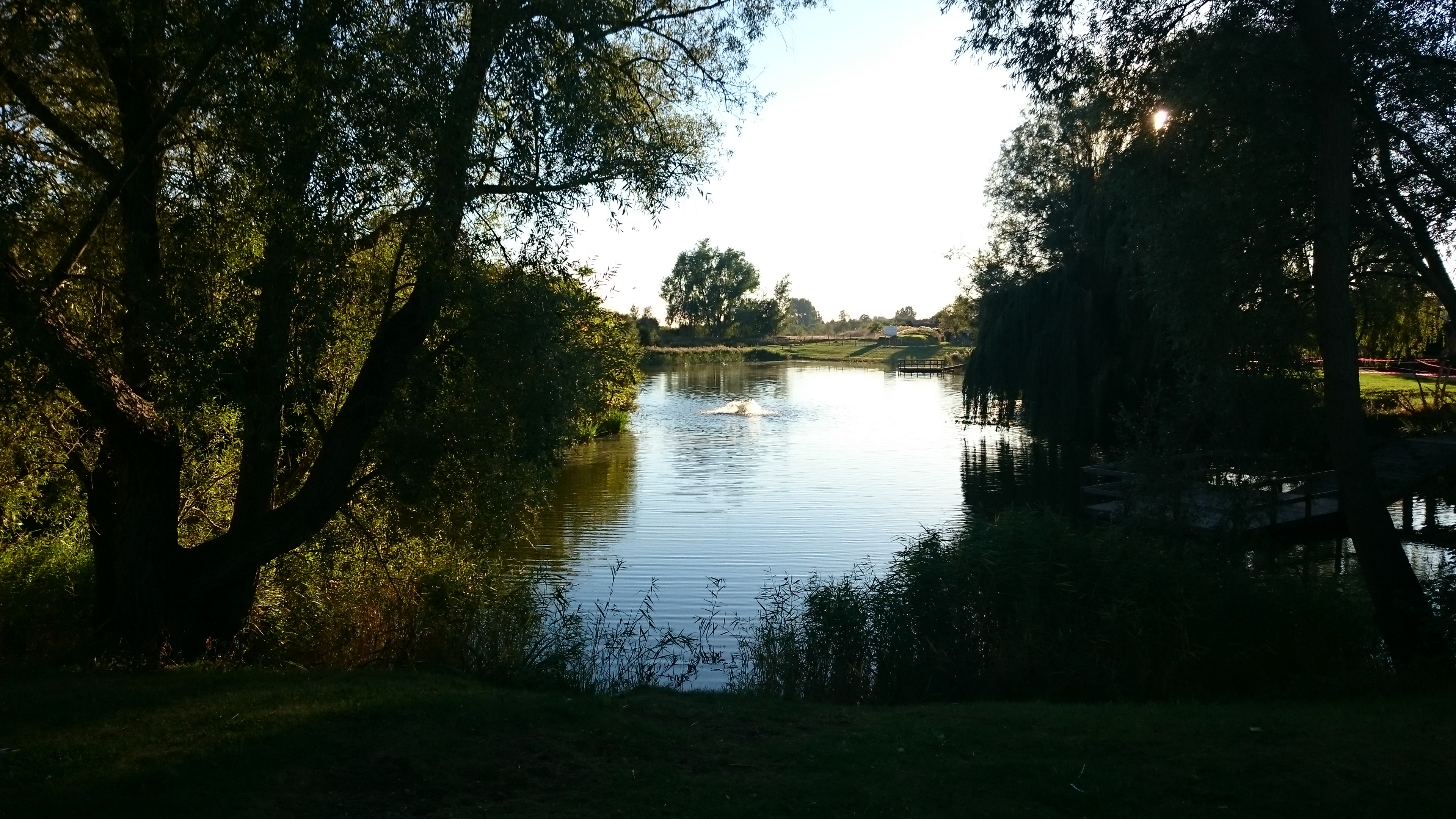 Le premier étang Markey. Une fontaine est installée entre mai et octobre 2016. Cet étang ne fait pas partie des espaces protégés.